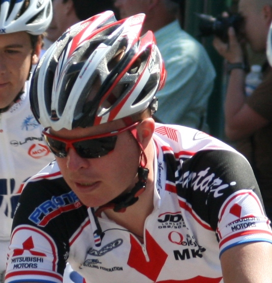 Stefan van Dijk, aux Quatre jours de Dunkerque 2008